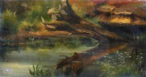 Motiv aus dem Spreewald: Abgestorbener Baumstamm, sich im Wasser spiegelnd. Öl auf Leinwand, 14 × 27 cm